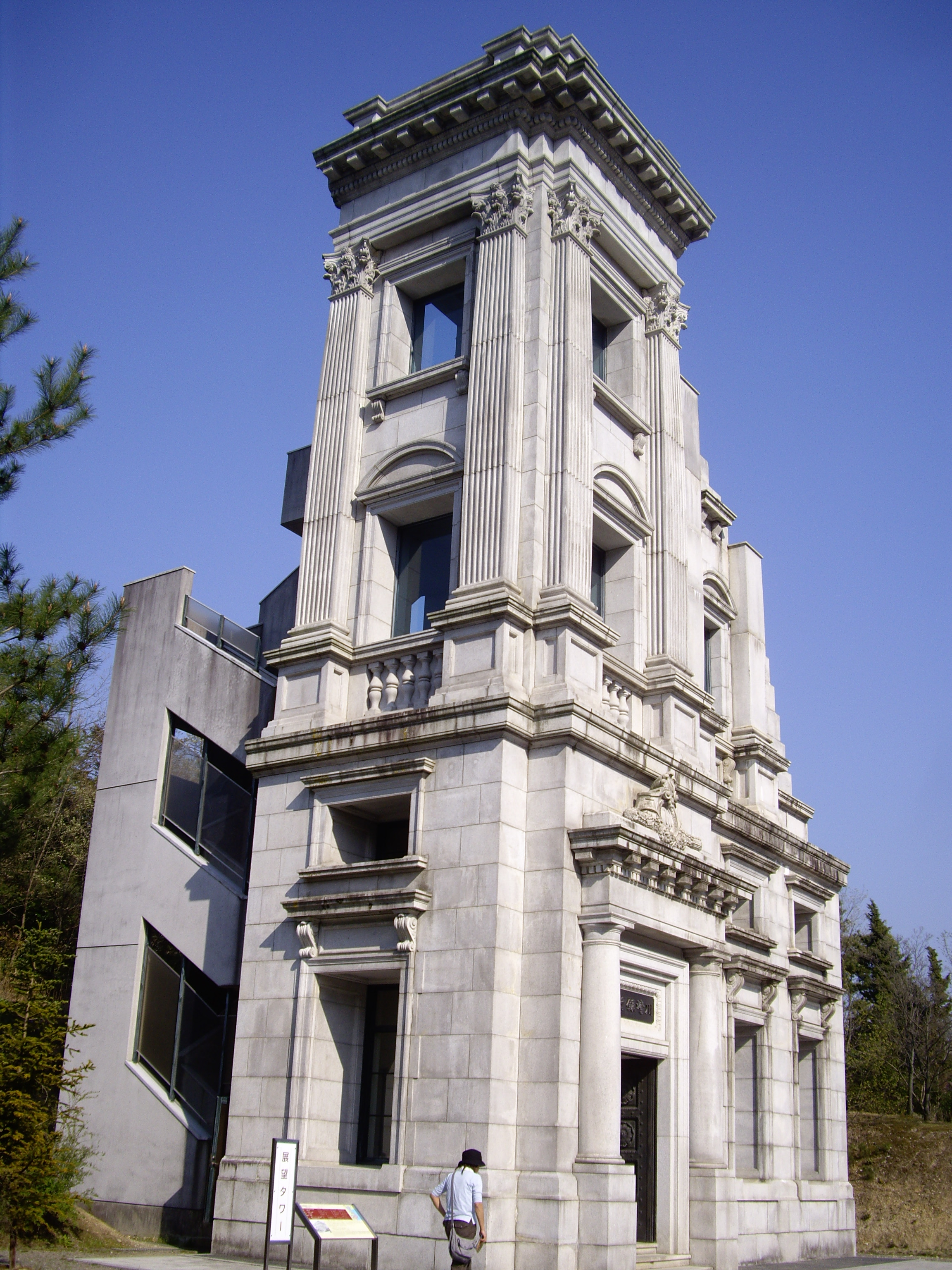 Meiji Mura